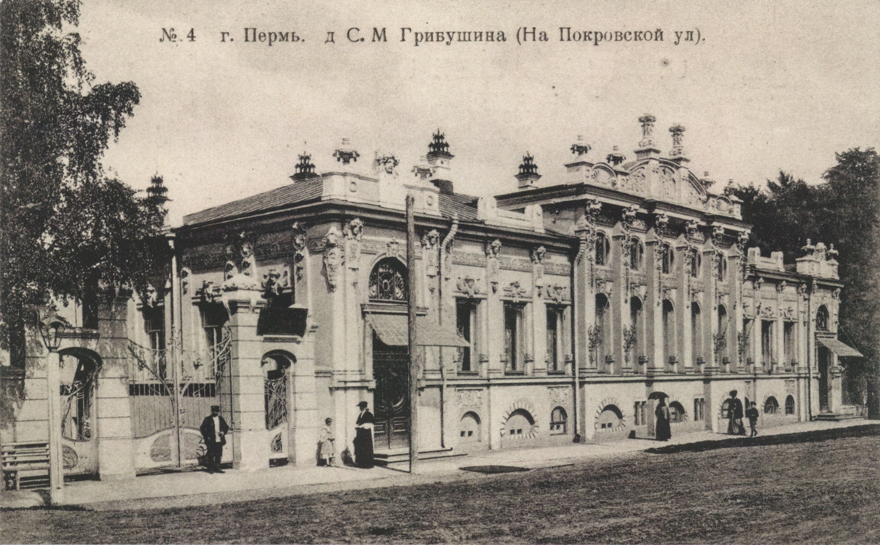 Дом С. М. Грибушина